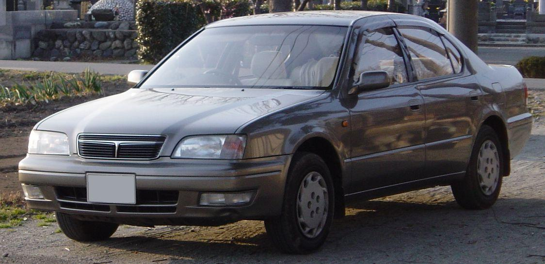 1994-1998 Toyota Camry V40 sedan.